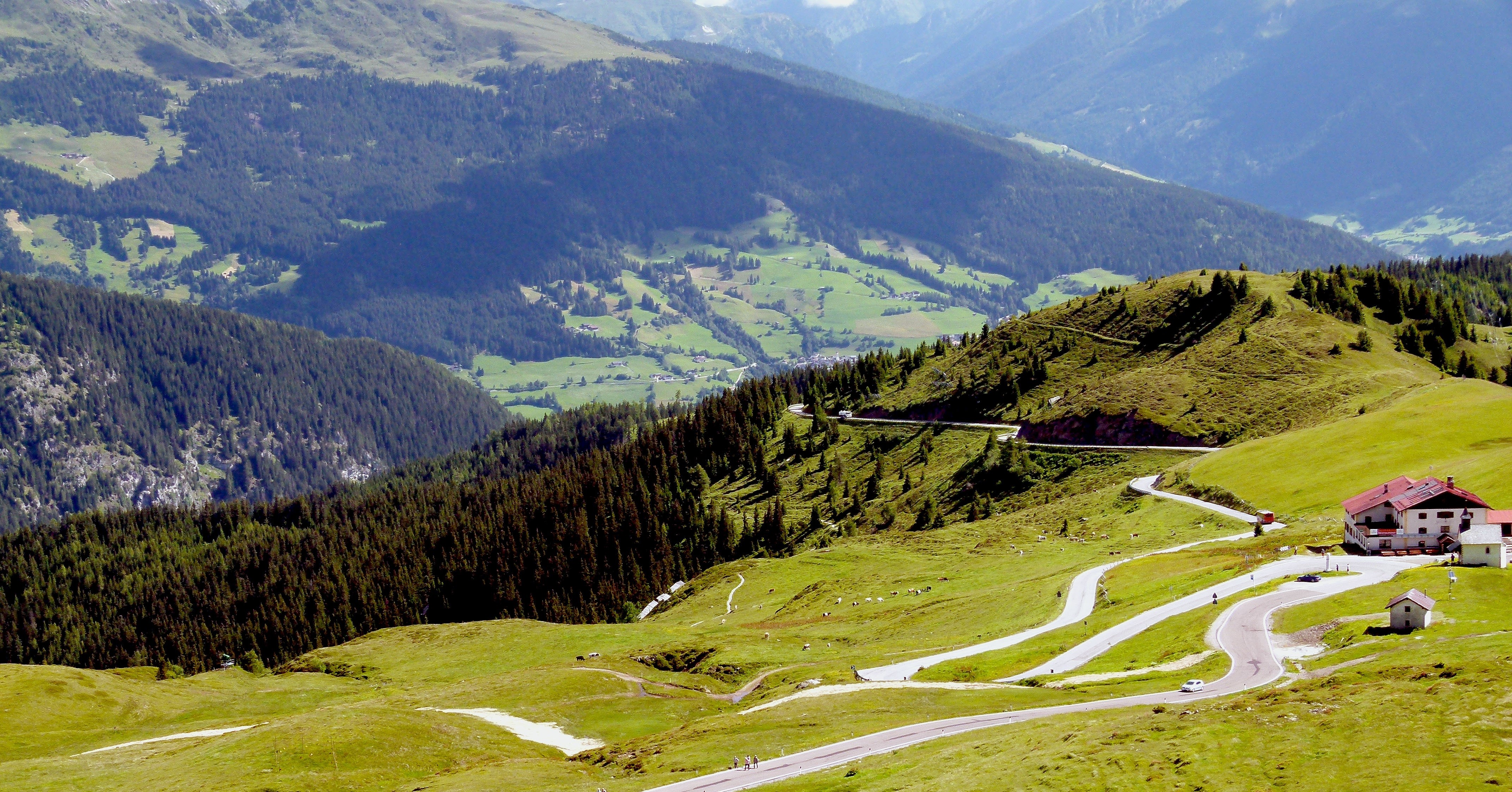 Jaufen-hágó, Dél-Tirol